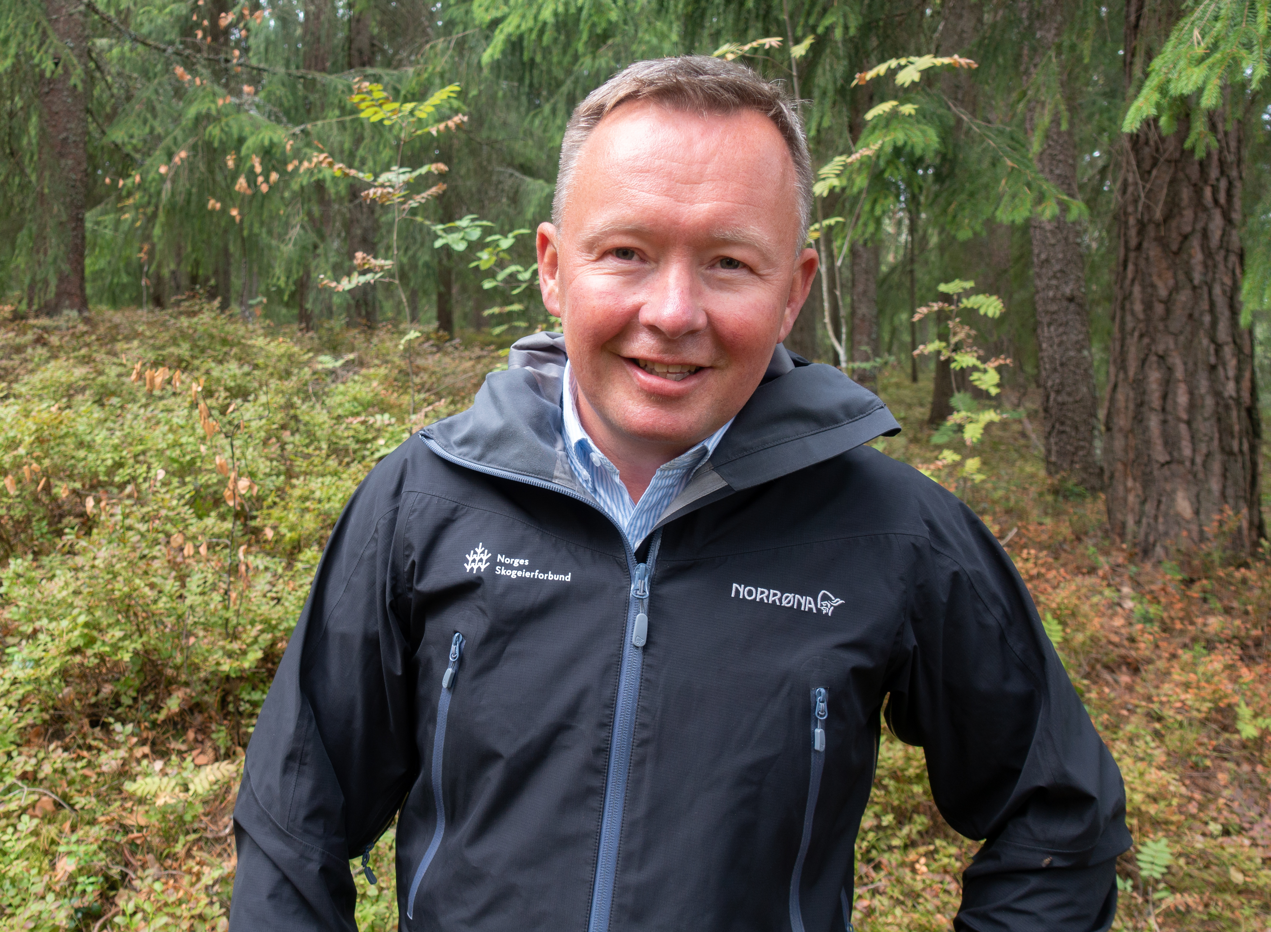 Bilde av Olav Veum 2018